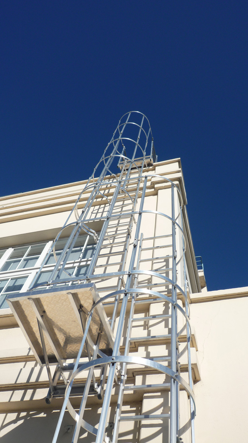 échelle à crinoline aluminium avec changement de volée